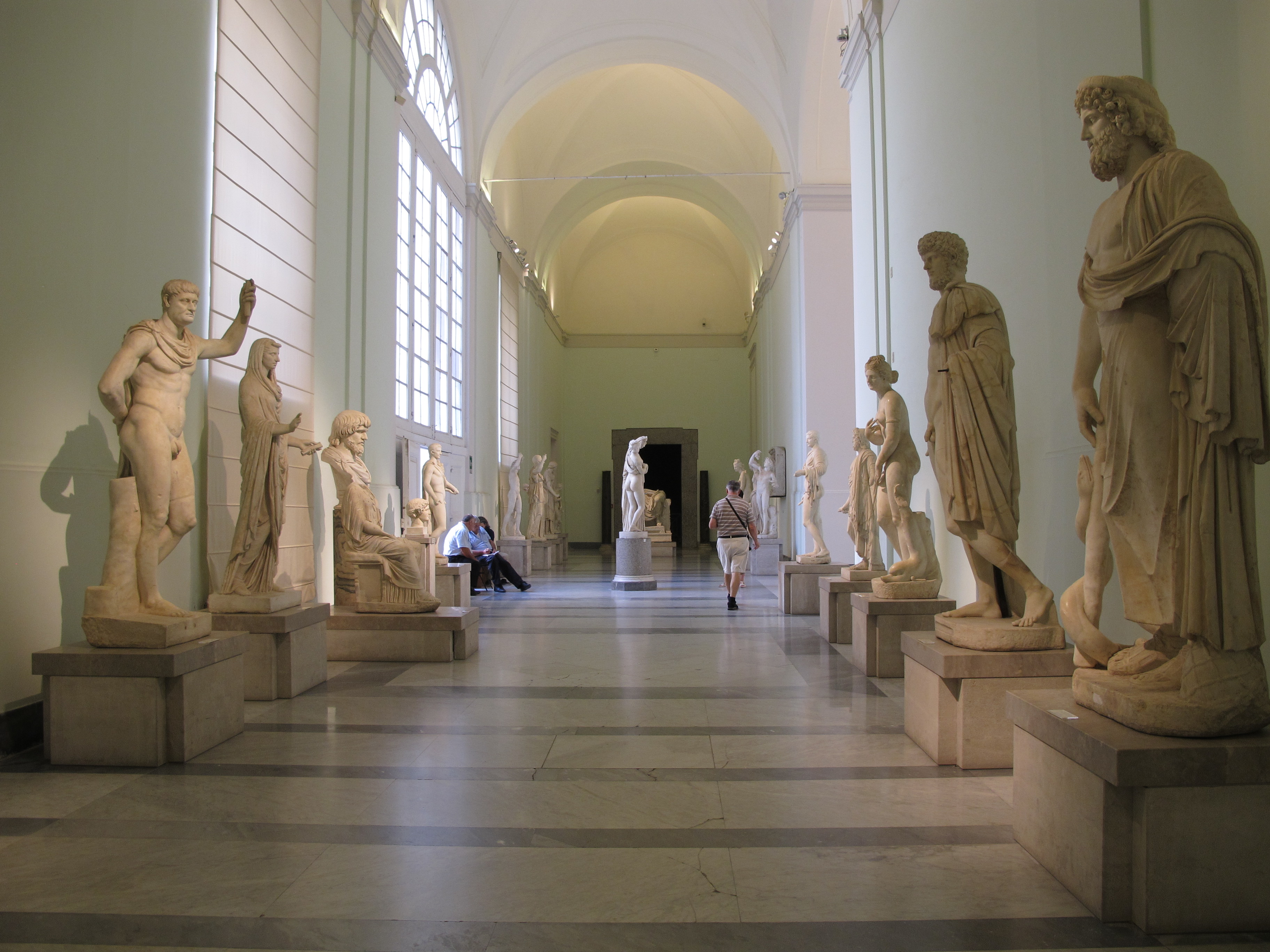 Napoli, museo archeologico nazionale. Collezione Farnese.